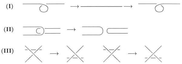 Reidemeister Bewegungen